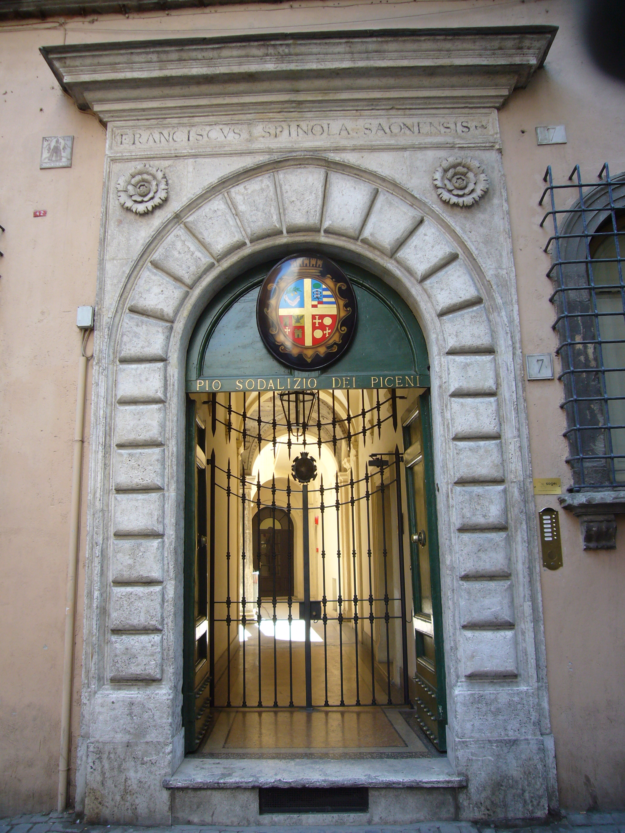 Roma, via di Parione. Palazzetto di Sisto V, sede del Pio sodalizio dei Piceni